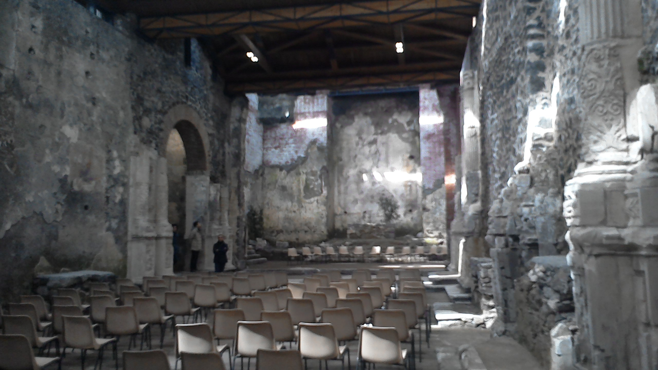 Vista dell'interno della chiesa di Campanarazzu, in fondo sono presenti i ruderi dell'altare.